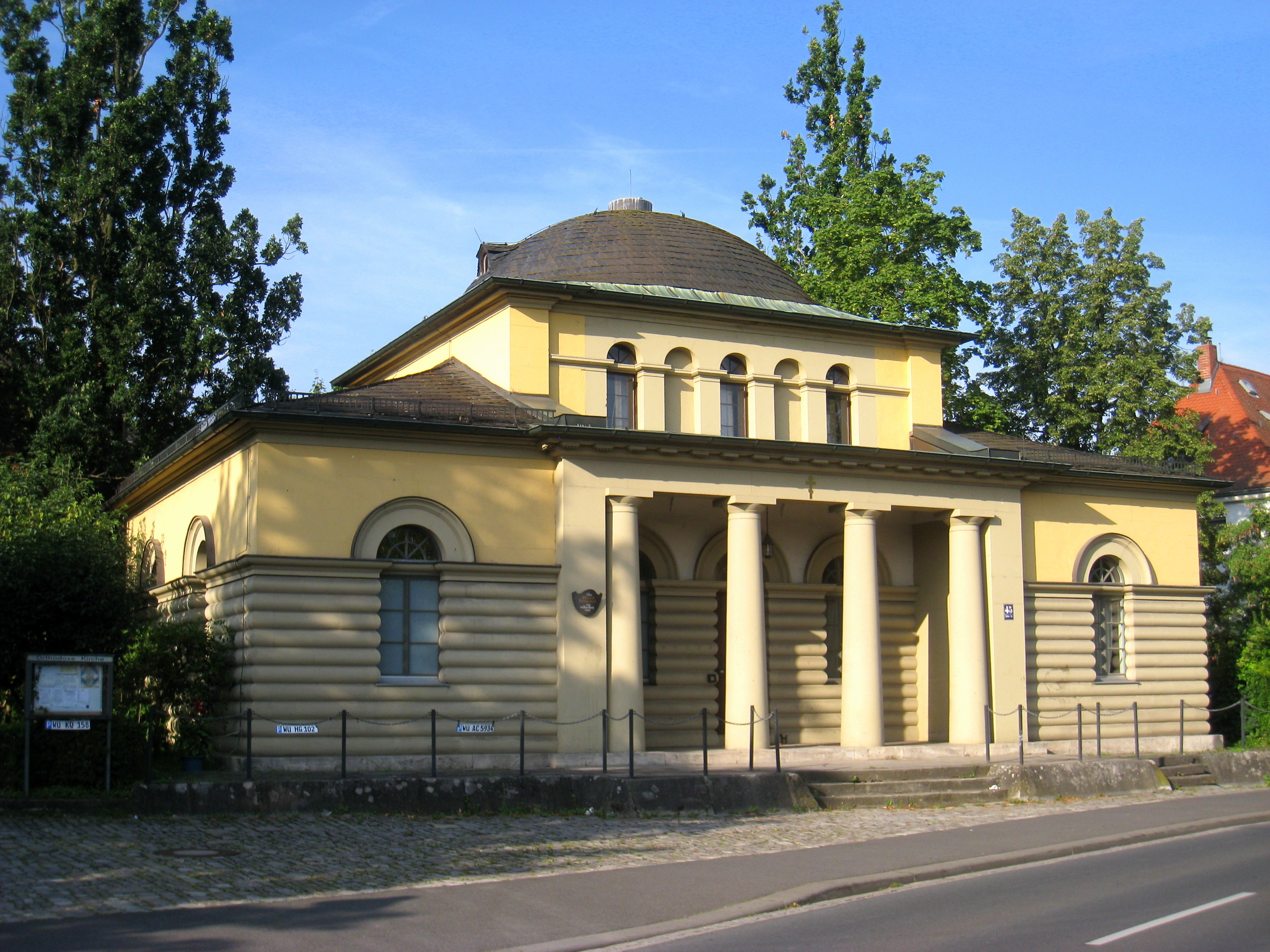 Zeller Torhaus, 45 Zeller Strasse, Würzburg, Germany. Built 1814; architect Peter Speeth (1772-1831).